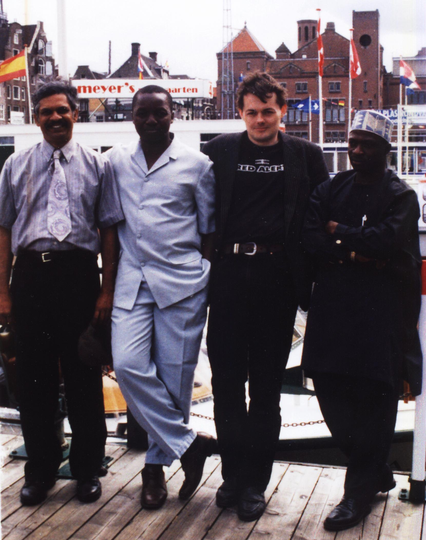 Beurs van Berlage